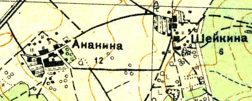 Топографическая карта Ленинградской области, квадрат О-35-23-А-а (Большая Систа), деревня Ананьино.